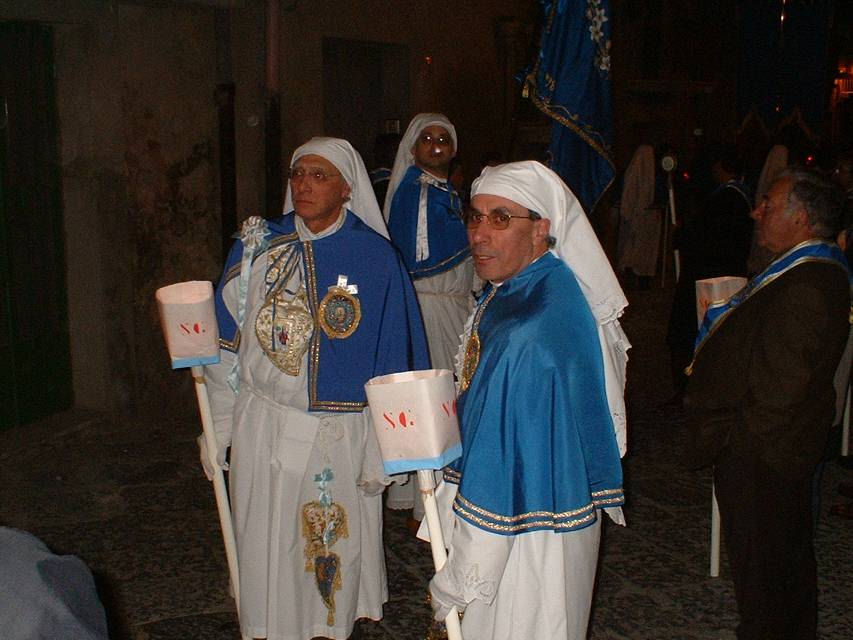 Alcuni "confratelli" della Chiesa di San Giuseppe, foto Carmelo Parrinelli Licensing Categoria:Immagini esclusivamente in GNU FDL